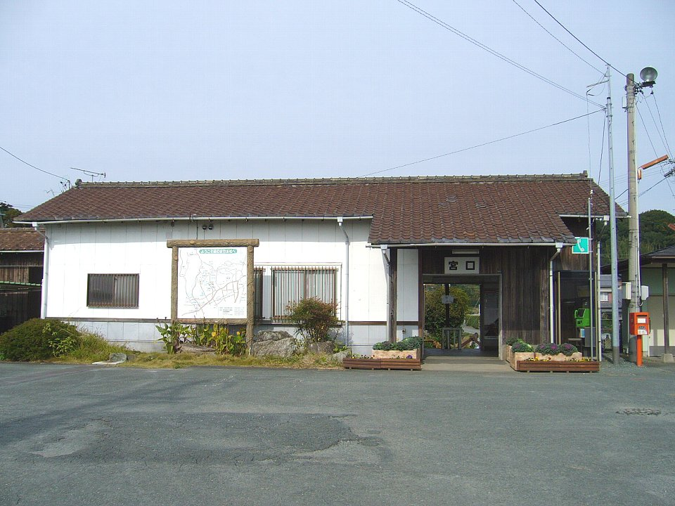 宮口駅天竜浜名湖鉄道宮口駅 駅舎 Bakkai撮影